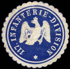 Sealing stamp Title: 117. Infanterie-Division Description: dunkelblau, weiß, geprägt Place: Mainz size: 4 cm